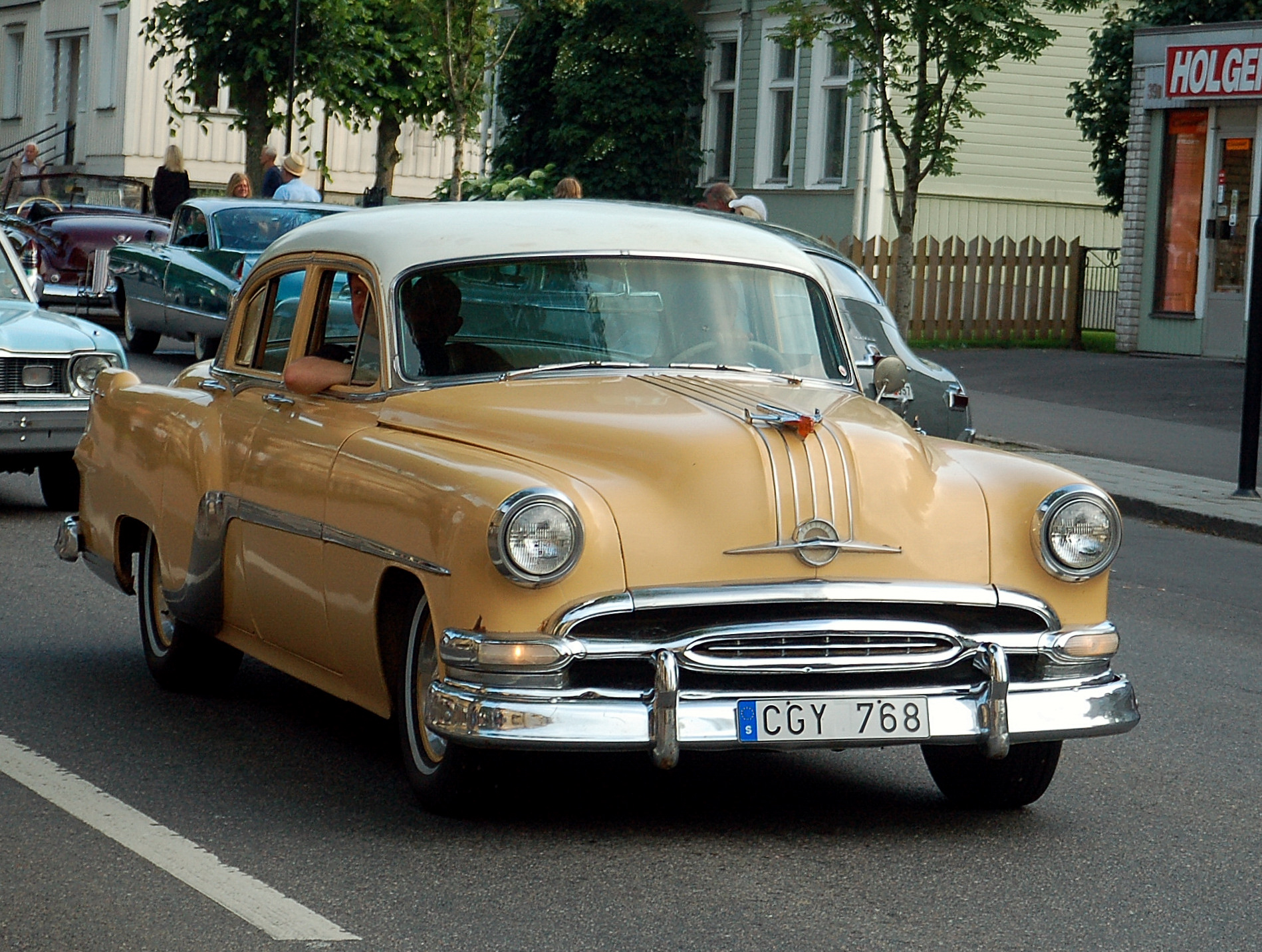 Fabrikat: PONTIAC STAR CHIEF Färg: Flerfärgad Fordonsår: 1954 Chassinummer: P8ZA8862 Växellåda: AUTOMAT Tjänstevikt, kg: 1910 Totalvikt, kg: 2320 Max lastvikt, kg: 410 Längd, mm: 5400 Bredd, mm: 1950 Drivmedel 1: BENSIN Motoreffekt, kw: 93,0 Fotot är taget på Sankt Olofsgatan ("Ströget") i Falköping. I bakgrunden skymtar fasaderna till S:t Olofsgatan 37 och 39.